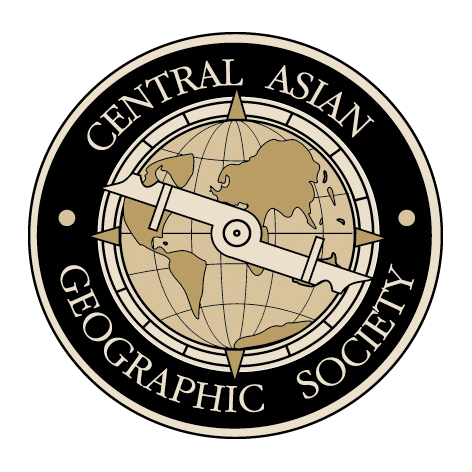 Логотип Центрально Азиатского географического общества Logo CAGS